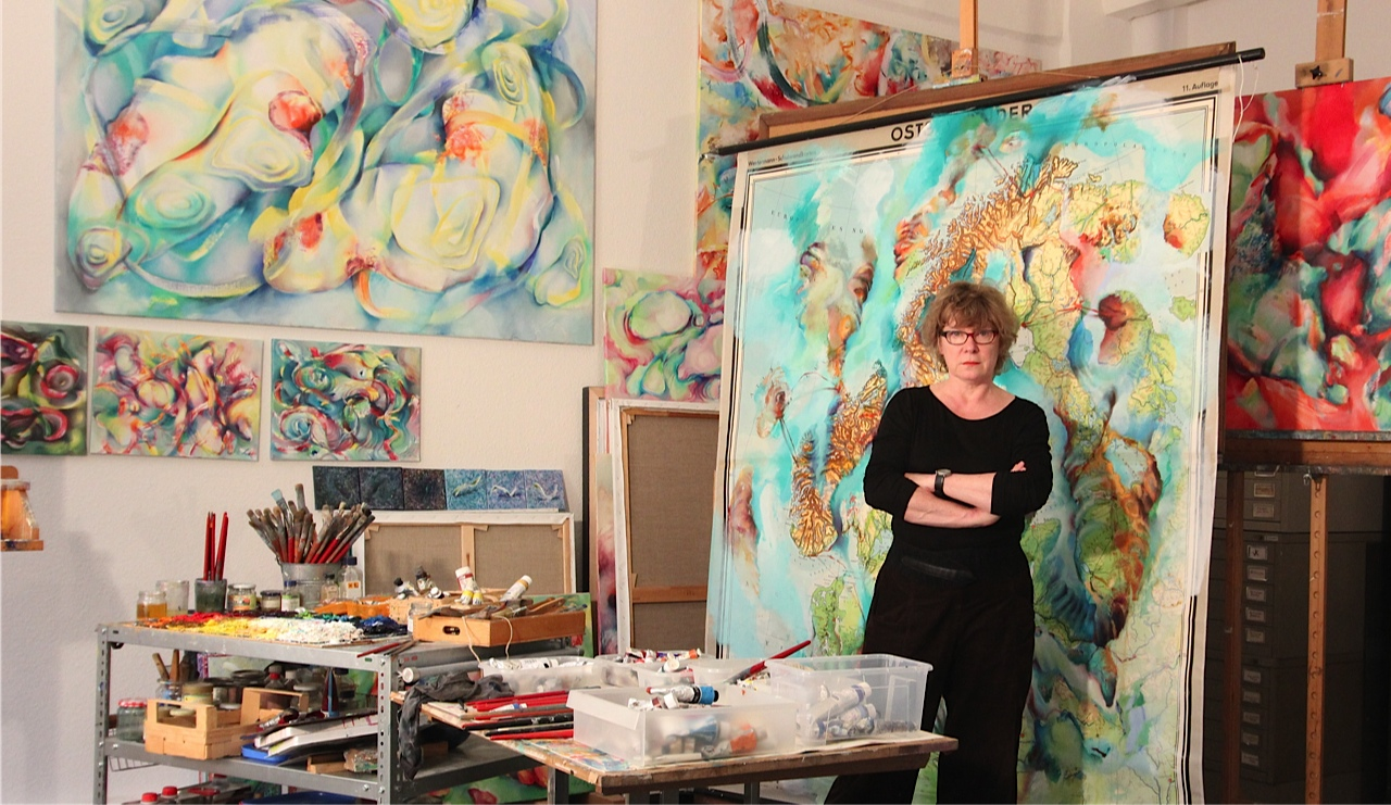 Es zeigt die Berliner Künstlerin Sabine Schneider in ihrem Atelier.